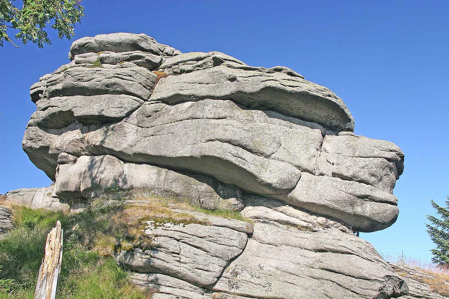 Čertův kámen na Černém vrchu v Jizerských horách, Jizera Mountains, Liberec District, Czech Republic Autor: Prazak date: 18. 7. 2006